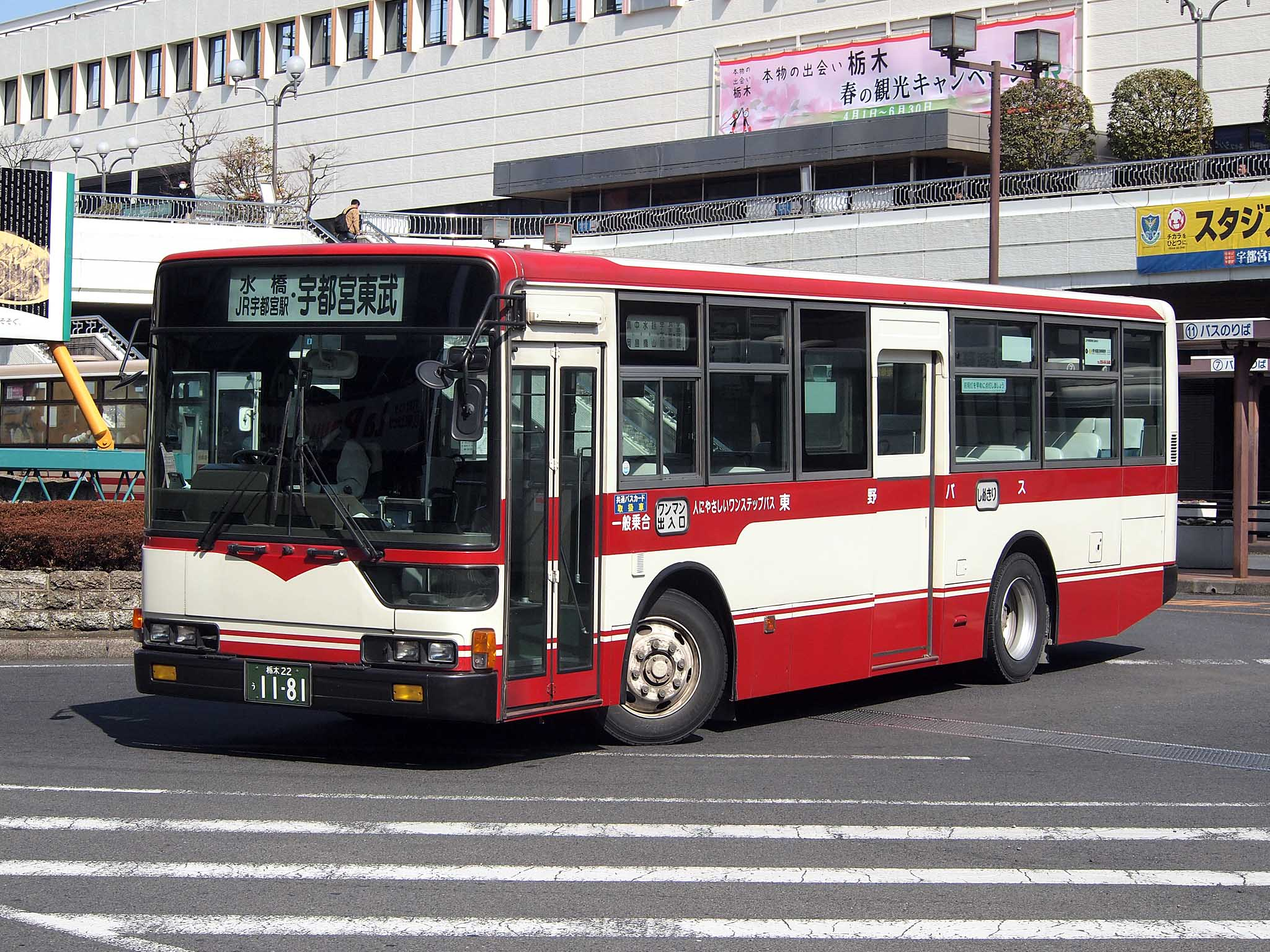 東野交通の三菱ふそう・エアロスターワンステップ車。東武グループ色導入前は路線車・貸切車共に紅白のカラーリングを採用していた。 型式：KC-MP317K 登録番号：栃木22う1181 撮影地：栃木県宇都宮市、JR宇都宮駅西口